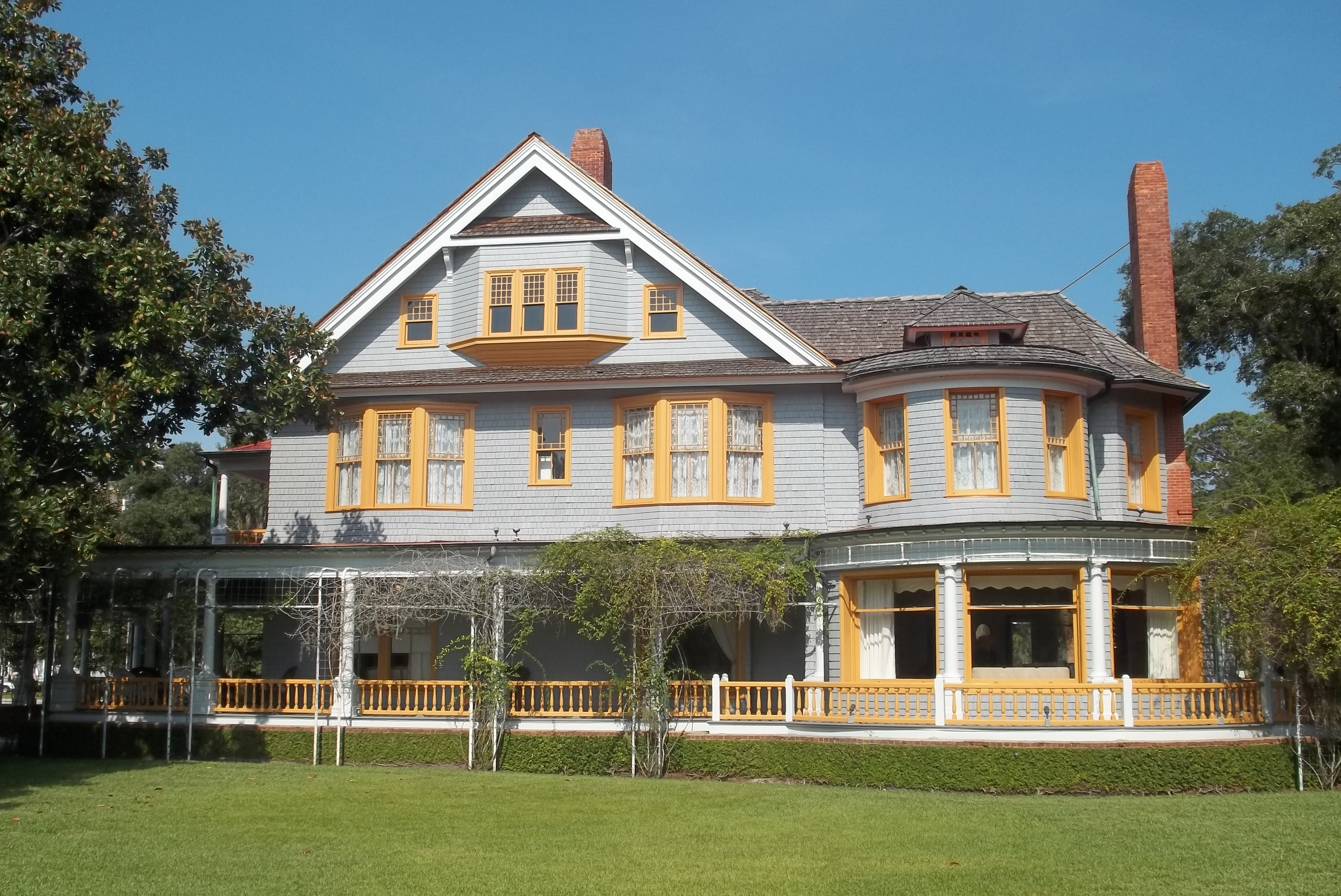 Jekyll Island: Rockefeller Cottage